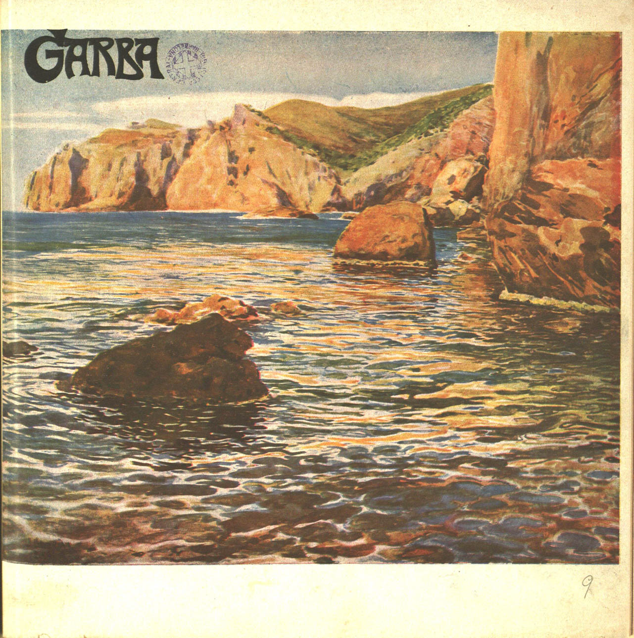 Garba (revista)